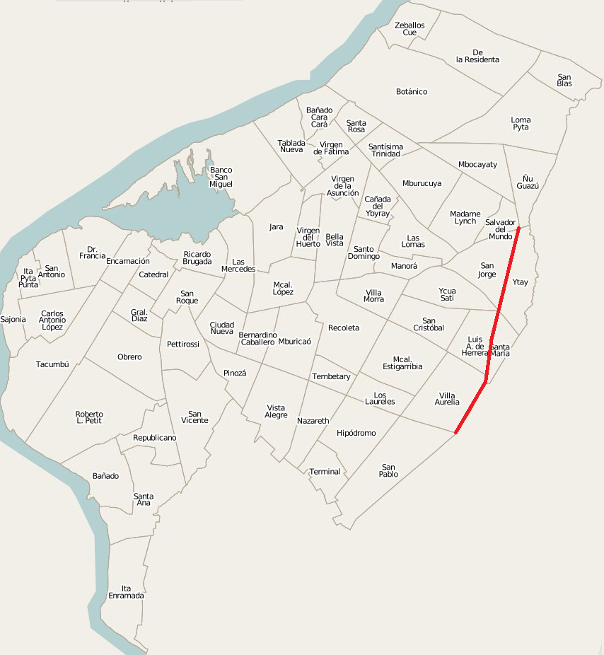 Mapa de la Avda. Madame Lynch en la ciudad de Asunción, Paraguay